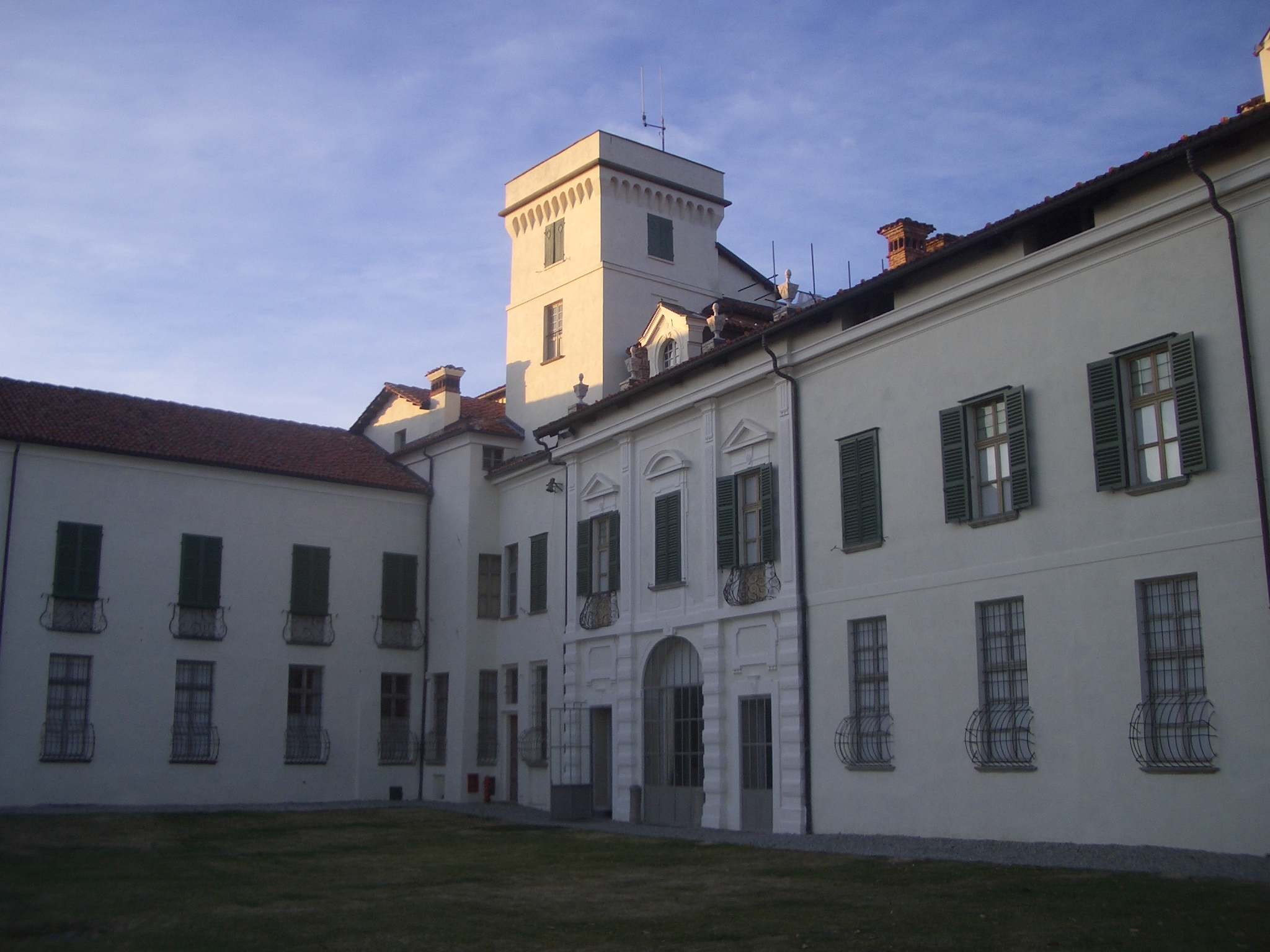 Castello di Masino, Caravino, Torino, Italy